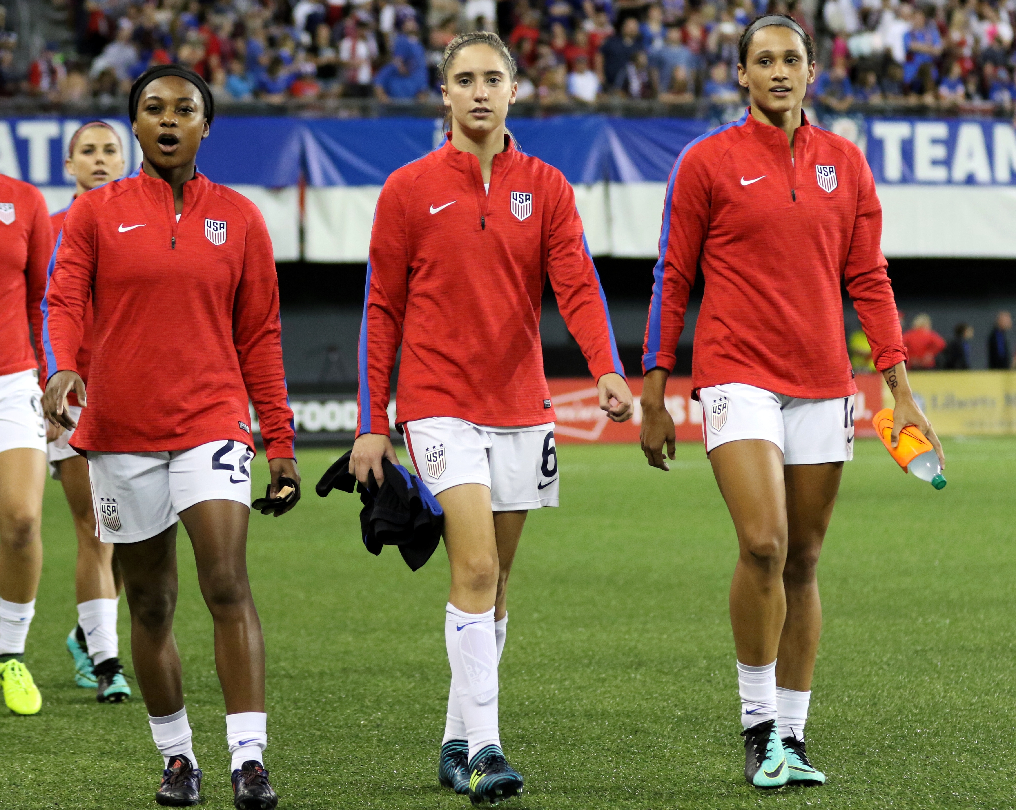 MorganBrian LynnWilliams